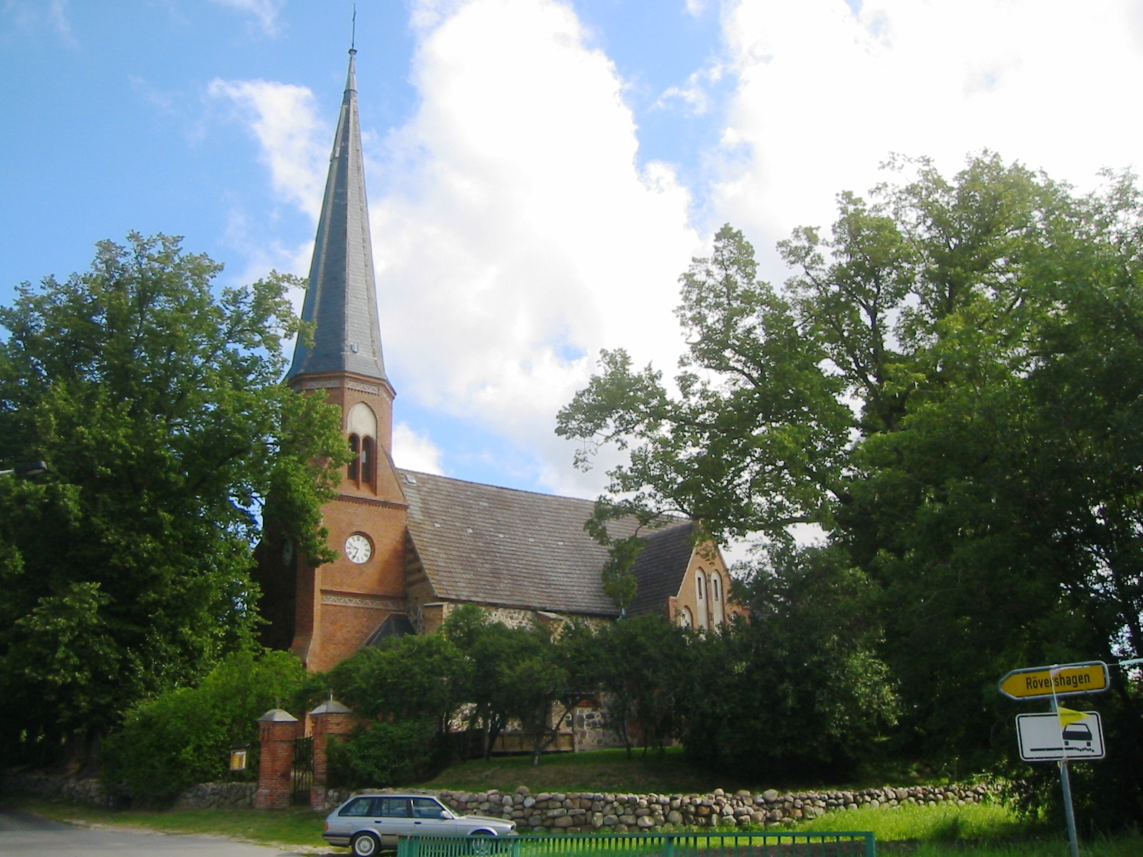 Dorfkirche in Volkenshagen, aufgenommen im August 2012 von der Hauptstraße der Gemeinde